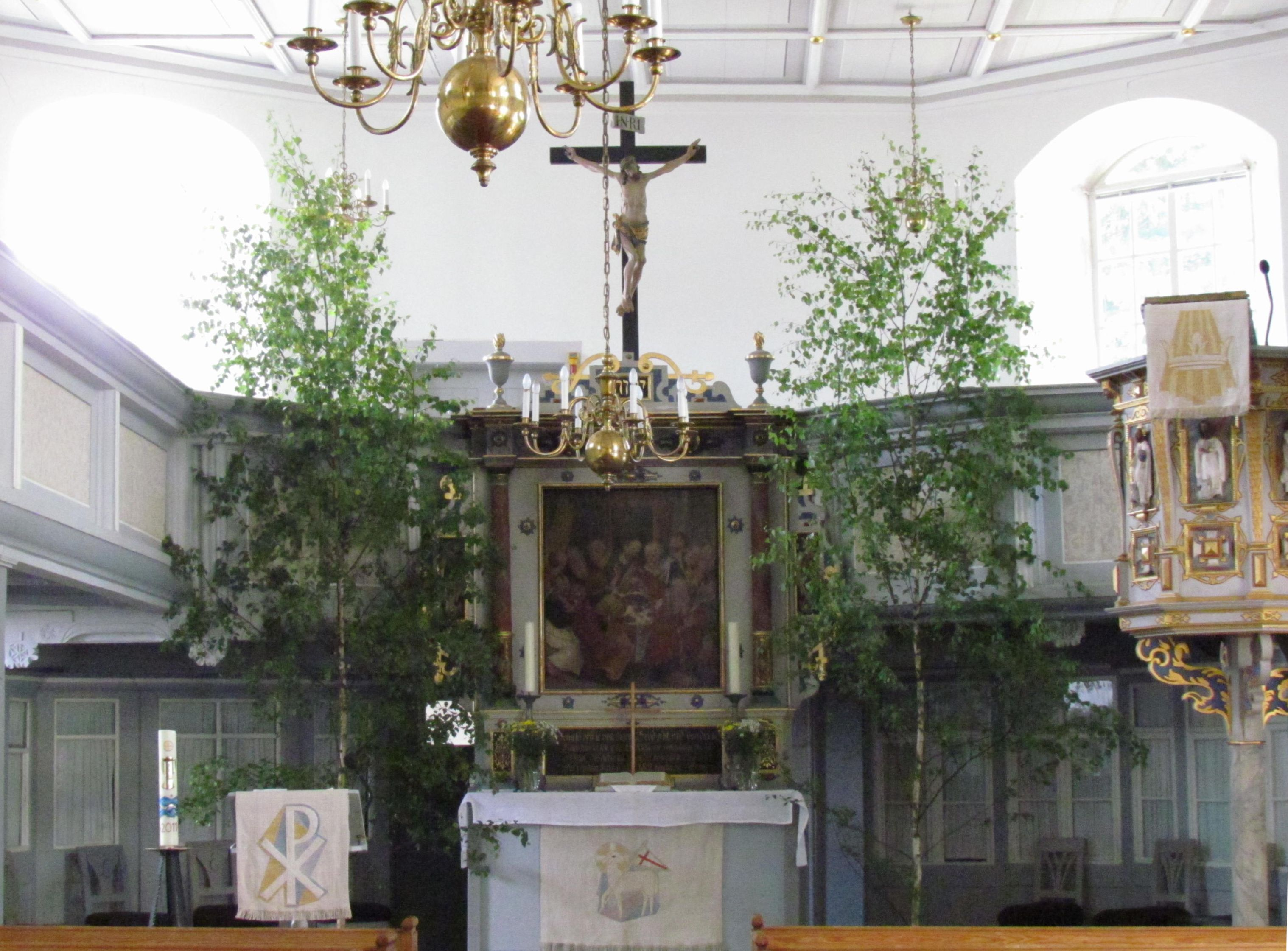 Blick zum Altar in der für das Pfingstfest mit Birken geschmückten Kirche